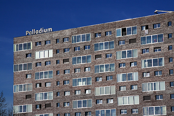 Paladium flat in Vinkhuizen Groningen